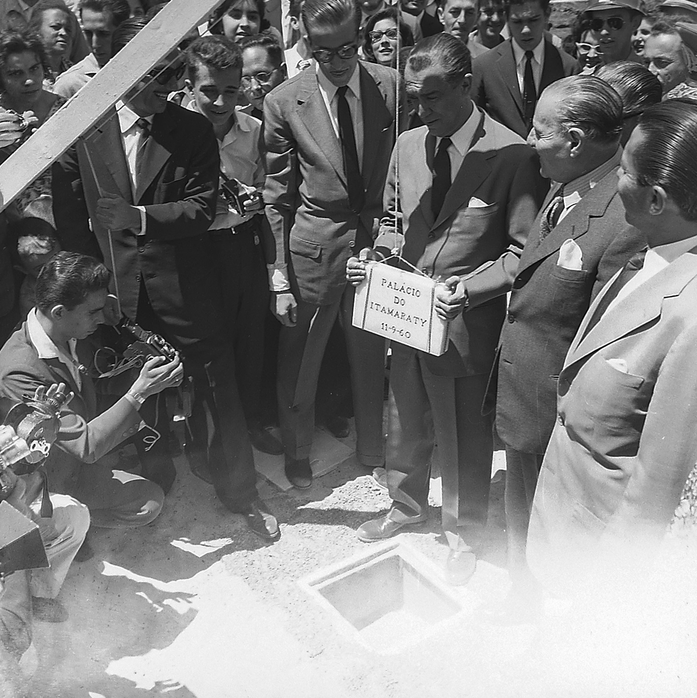 Imagem do Fundo Agência Nacional, do Arquivo Nacional